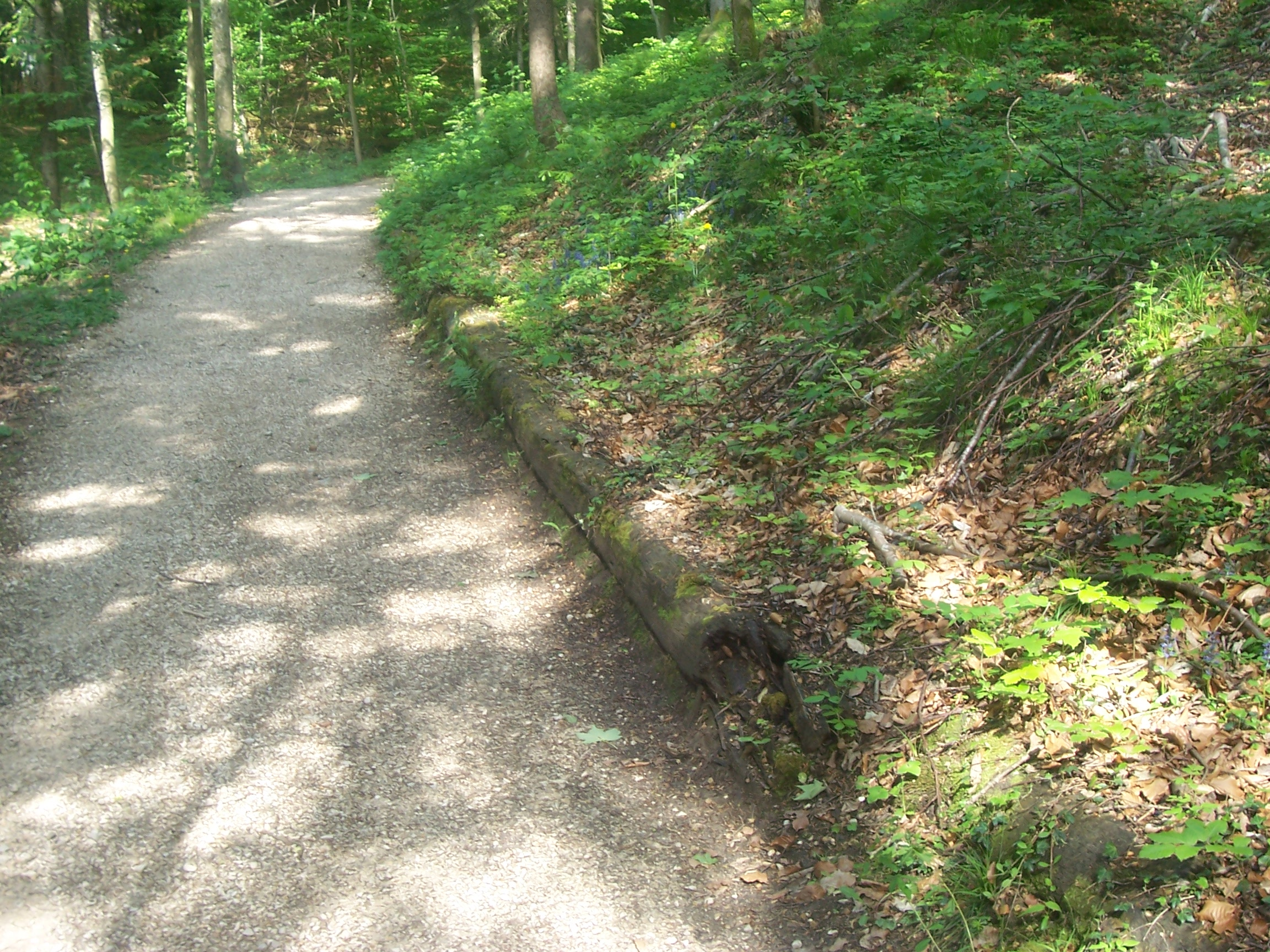 Hölzerne Soleleitung oberhalb des Thumsees Bei Verwendung bitte ich hier um einen Hinweis, wo das Foto genutzt wird.